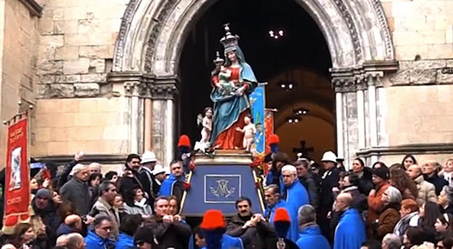 Festa della Madonna del Pilerio protettrice di Cosenza